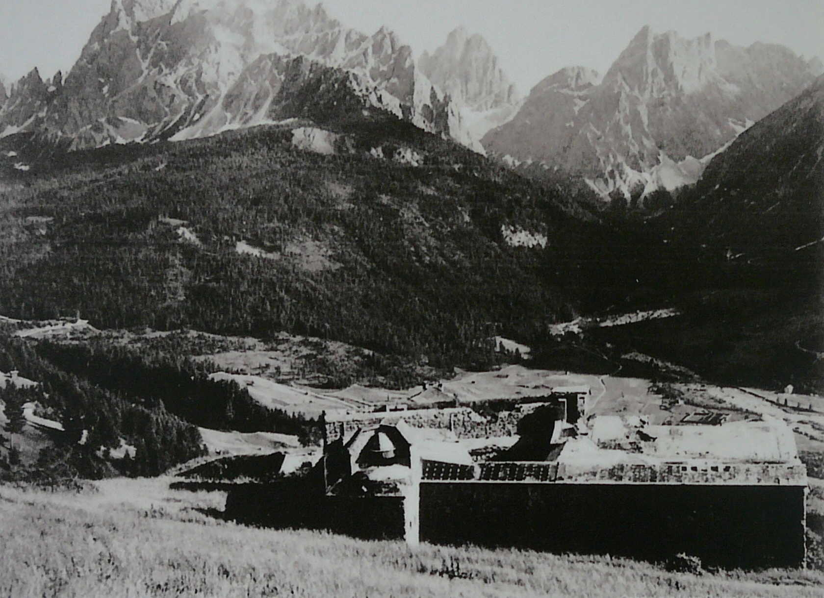 Foto storica del Forte Mitterberg, in Sexten (Sesto), Sexten Dolomites (Dolomiti Sestini)